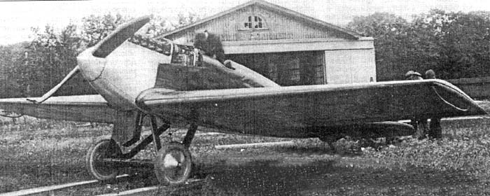 ИЛ-3 (И-1) головной серии